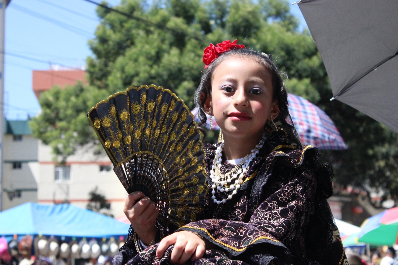 Niña con el disfraz de española durante el Pase del Niño Viajero 2013 en Cuenca (Ecuador).